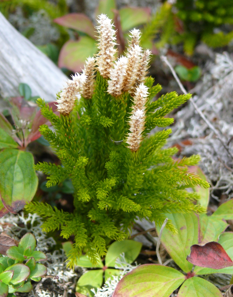 Плаун можжевельниковый. О. Сахалин